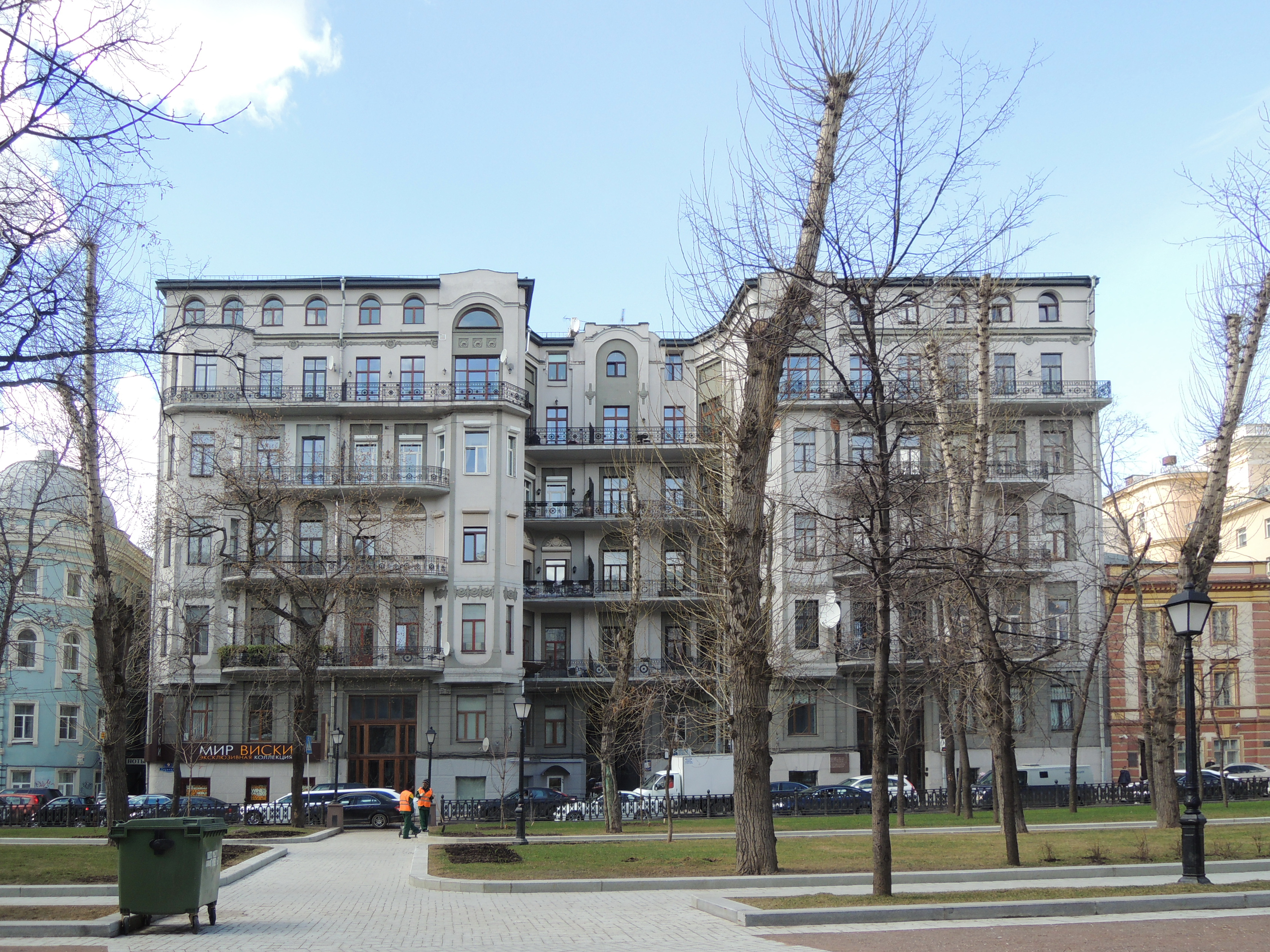 Тверской бульвар. № 9 — Доходный дом И. М. Коровина (1906, архитектор И. Г. Кондратенко), заявленный объект культурного наследия